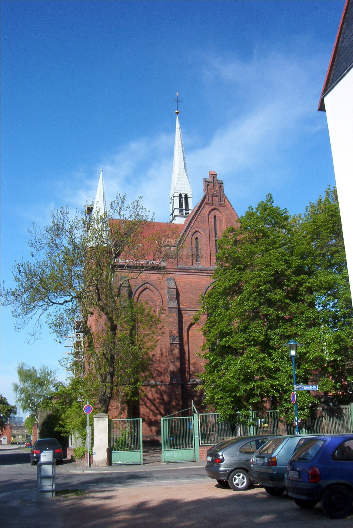 Sankt-Norbert-Kirche in Magdeburg-Buckau